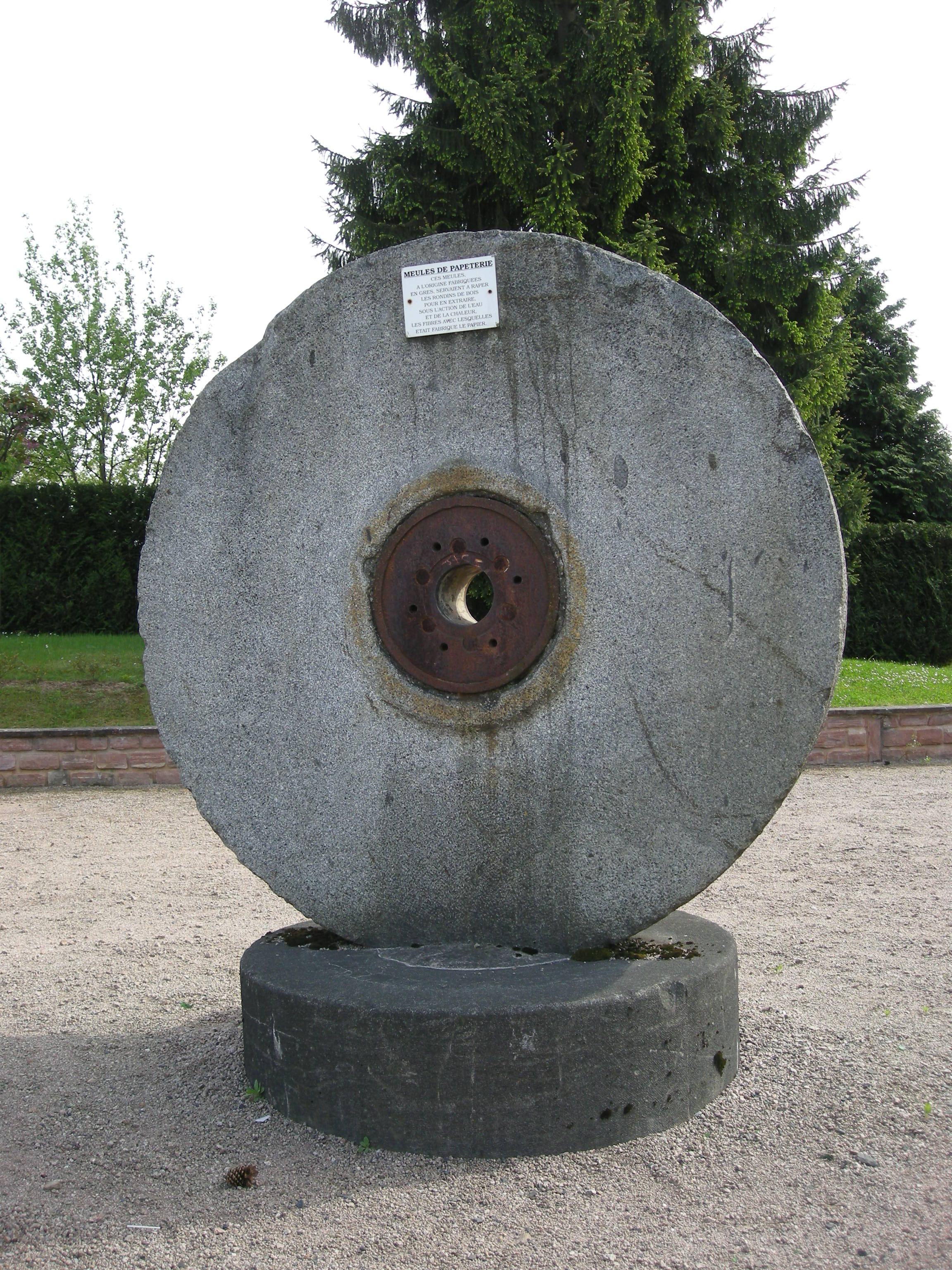 Meule de papeterie à Etival-Clairefontaine (Vosges). (Ces meules, à l'origine fabriquées en grès, servaient à râper les rondins de bois pour en extraire, sous l'action de l'eau et de la chaleur, les fibres avec lesquelles étaient fabriquées le papier.